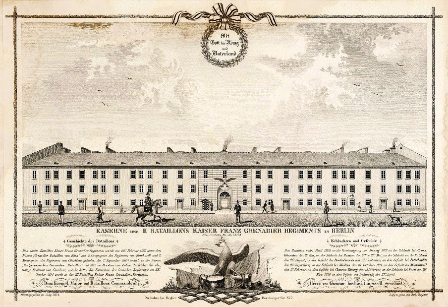 Die Kaserne des II. Bataillons des Kaiser Franz Grenadier-Regiments in Berlin, Neue Friedrichstraße. Die Kaserne wurde in der 2. Hälfte des 18. Jahrhunderts errichtet und ab 1815 vom Kaiser-Franz-Regiment genutzt, bis zum Umzug 1866 in die Blücherstraße. Stahlstich